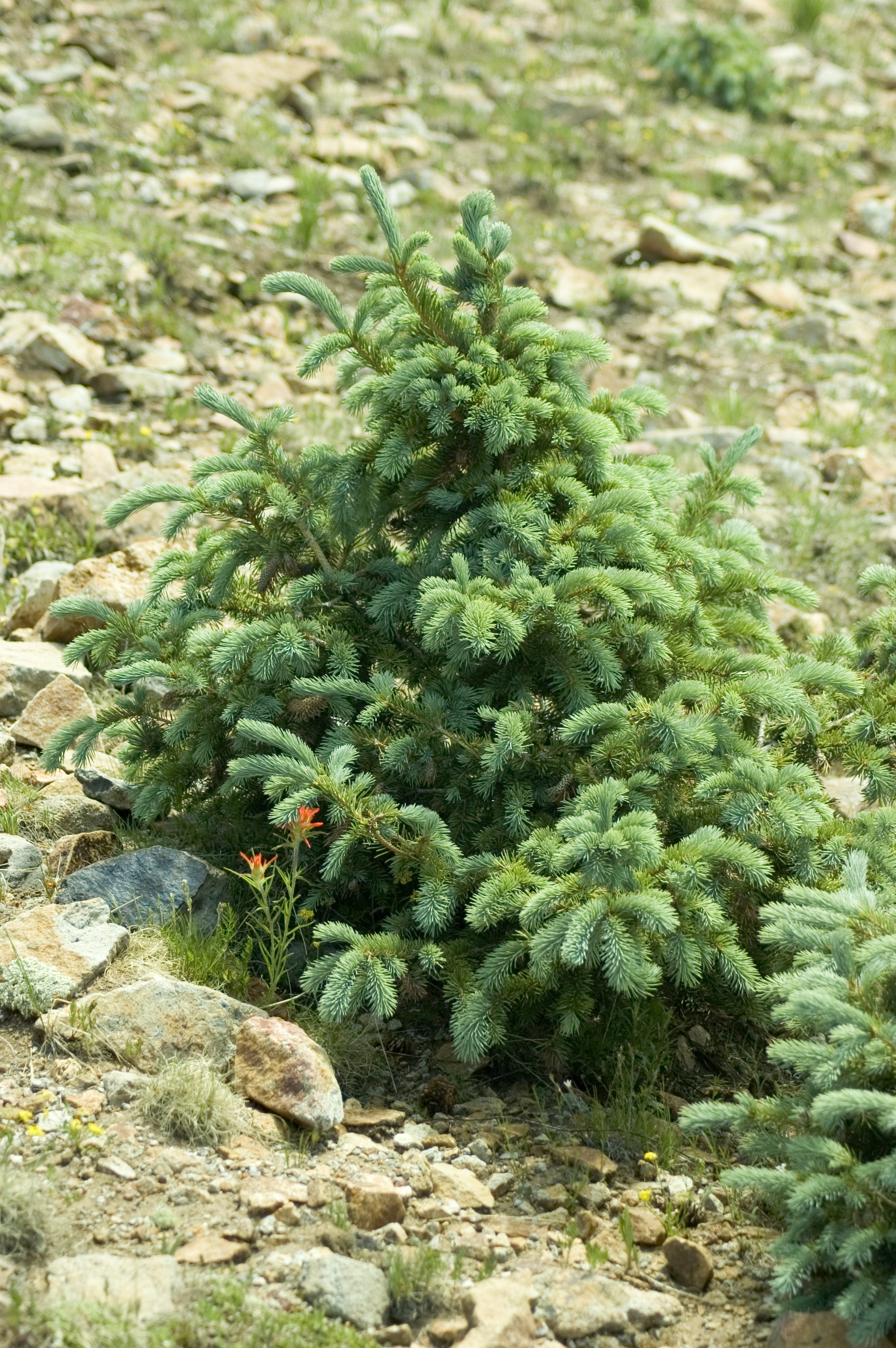 Young Picea engelmannii, Sierra Blanca, NM, USA.